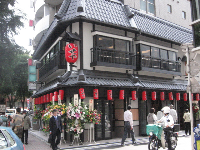 吉祥寺にある老舗焼き鳥店、いせや総本店の新店舗。写真はオープン当日（2008年6月4日）の模様（開店3時間前に撮影）。